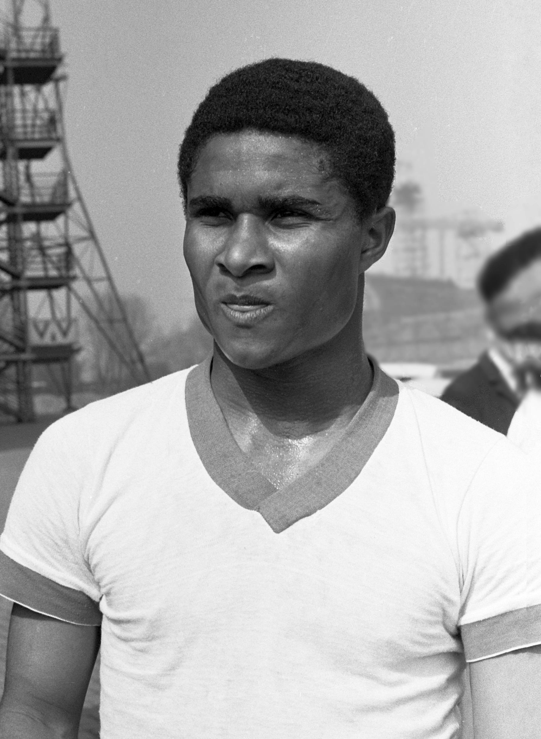 Eusébio tijdens een training voor een Europese wedstrijd tegen Feyenoord